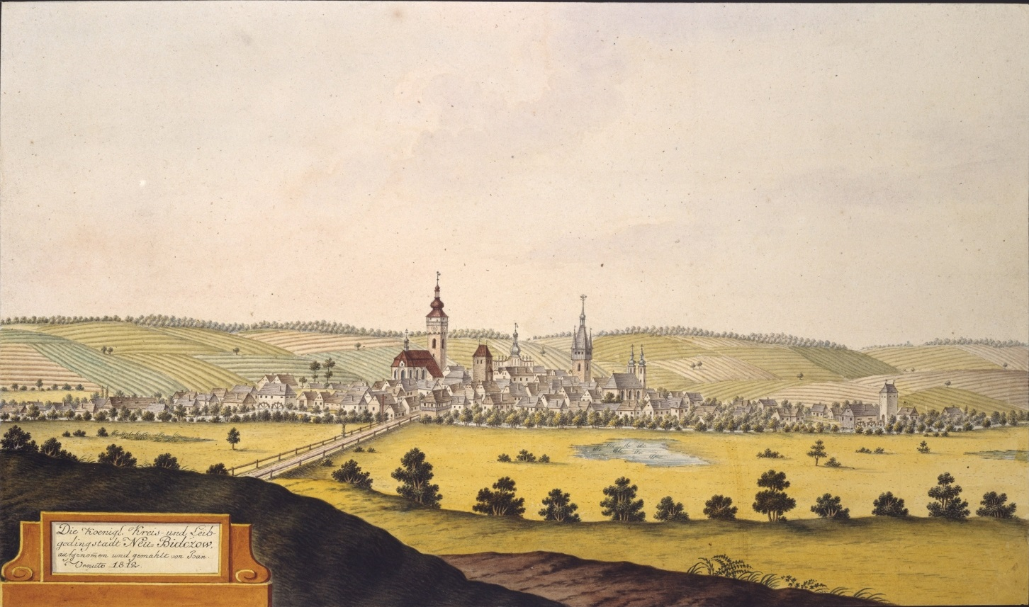 Nový Bydžov. Die Koenigl. Kreis- und Leibgedingstadt Neu Bidczow aufgenommen und gemahlt von Joan. Venuto 1812